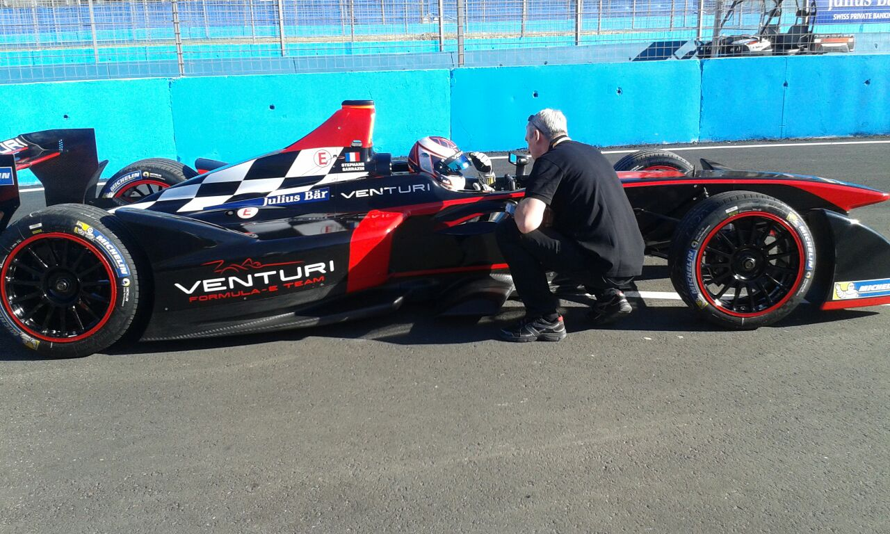 aaaaa